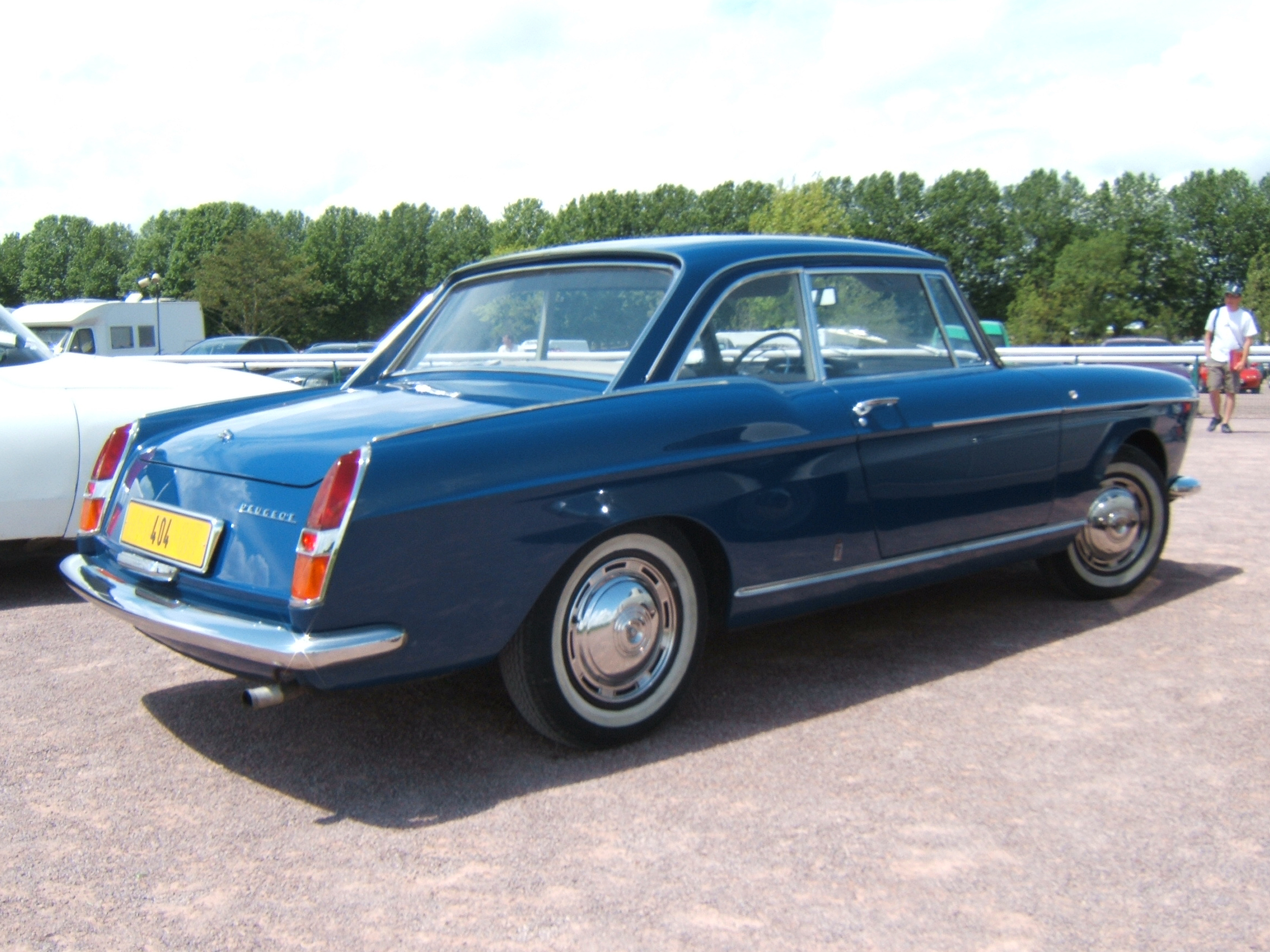 Peugeot 404 coupé, dessinée par Pininfarina.